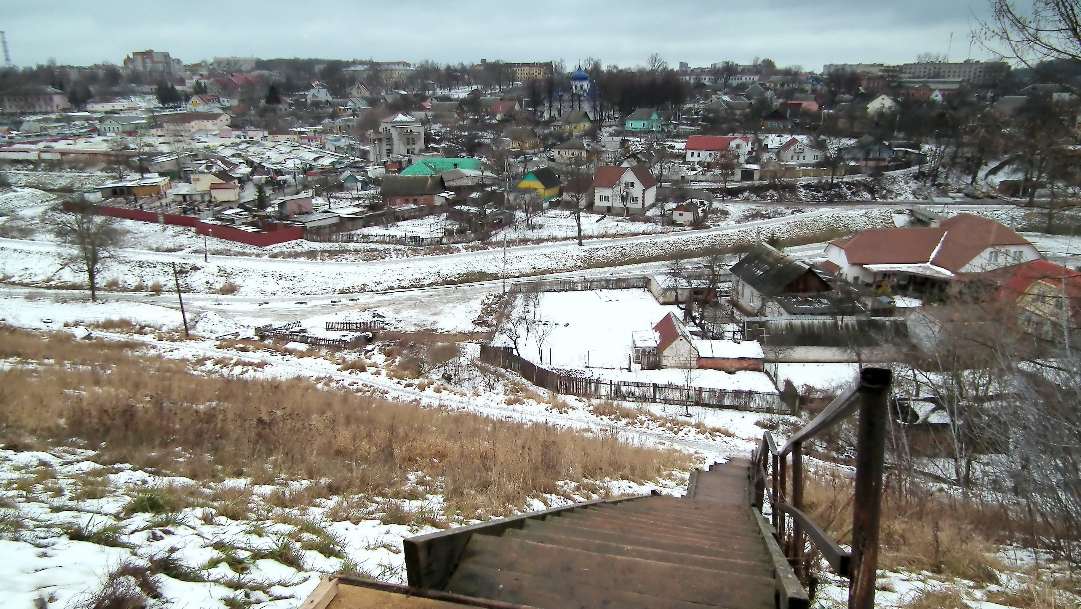 лестница к Быховскому рынку